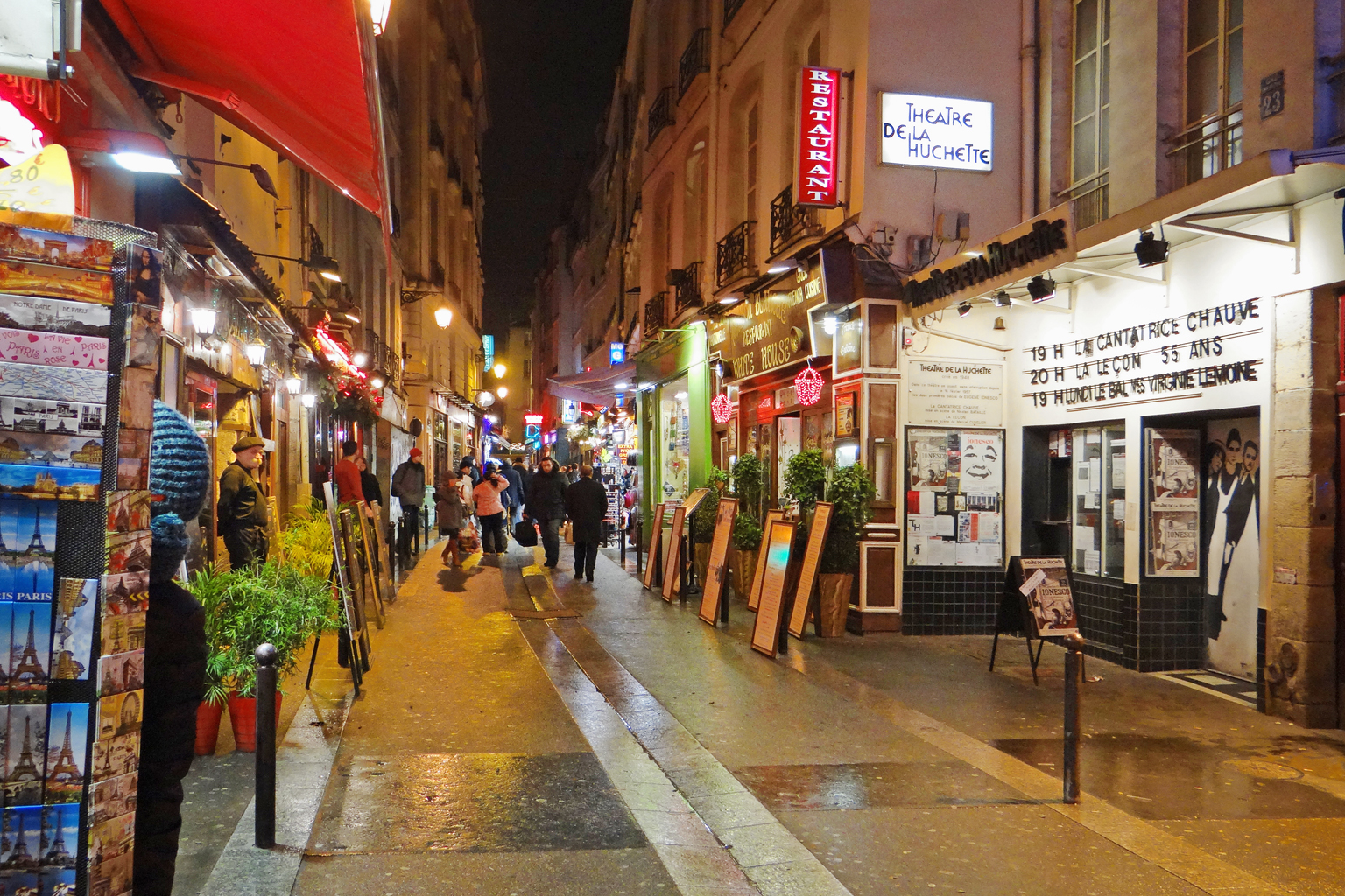 La rue de la Huchette, dans le quartier latin, à Paris, photographiée au niveau du théâtre où deux pièces d'Eugène Ionesco sont jouées sans interruption depuis 1957